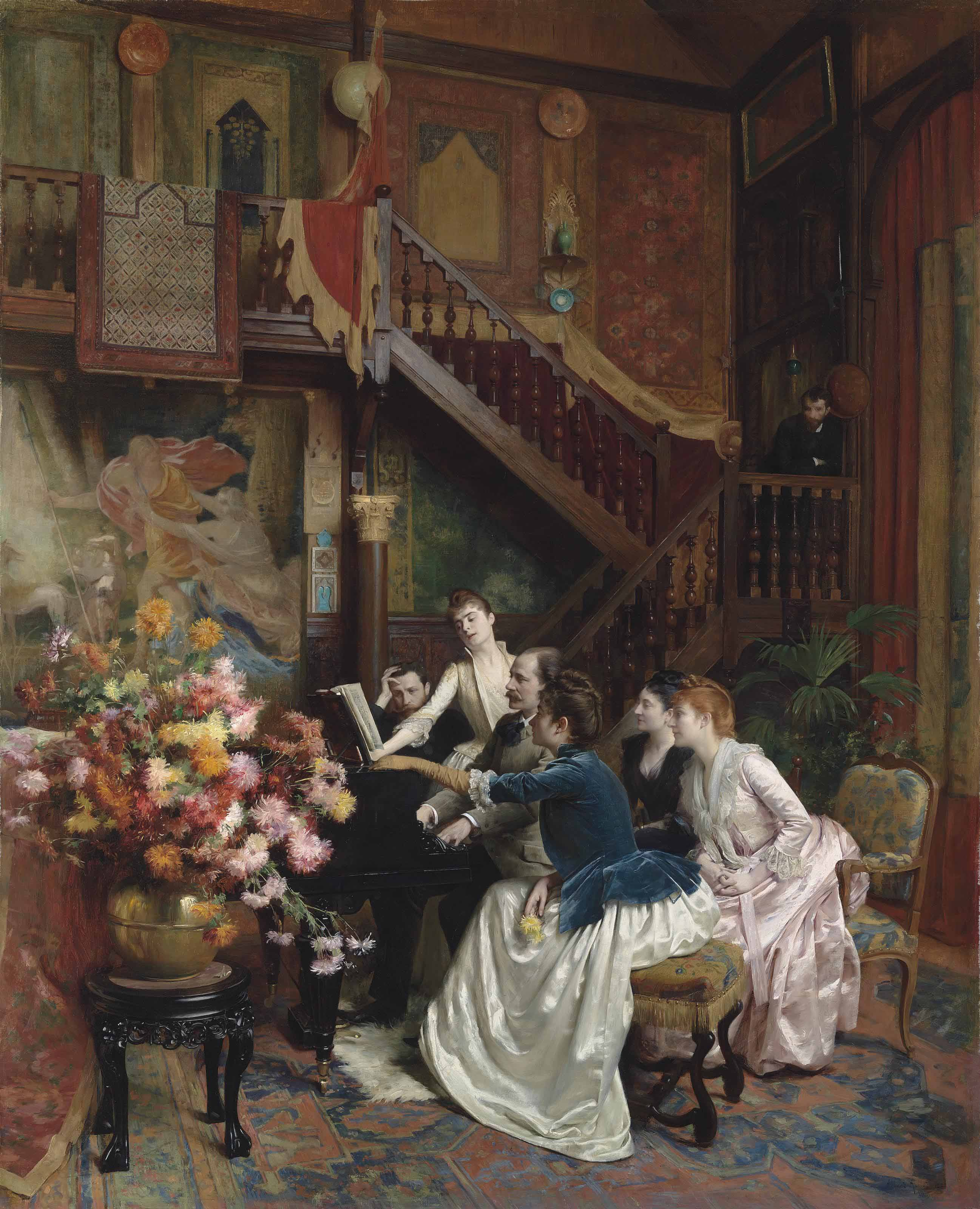 Autour d'une partition